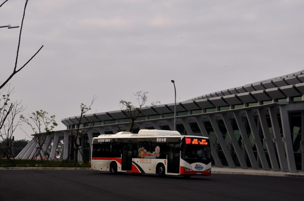 雲林快捷公車201路高鐵雲林站前